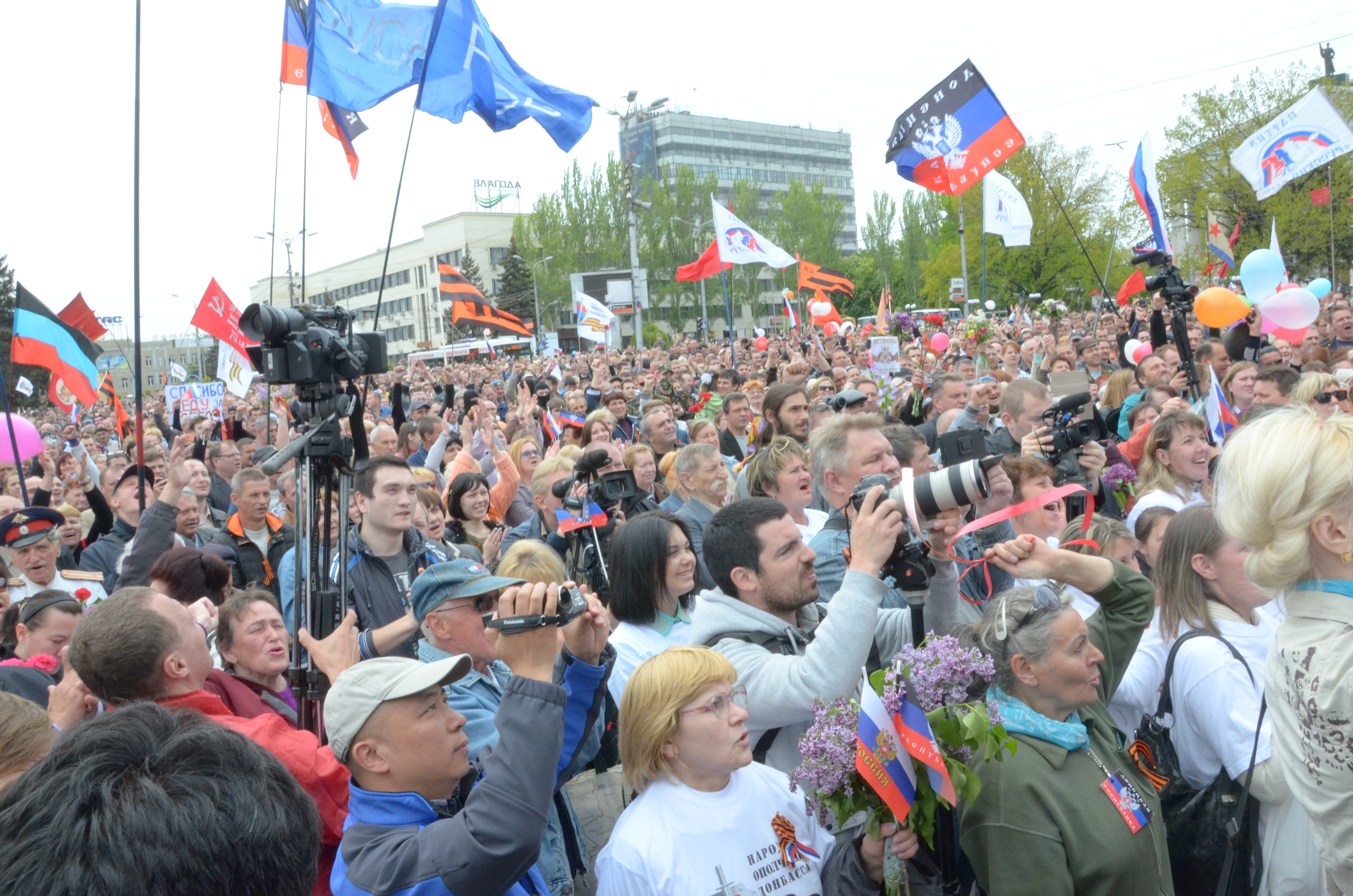 День Победы в Донецке